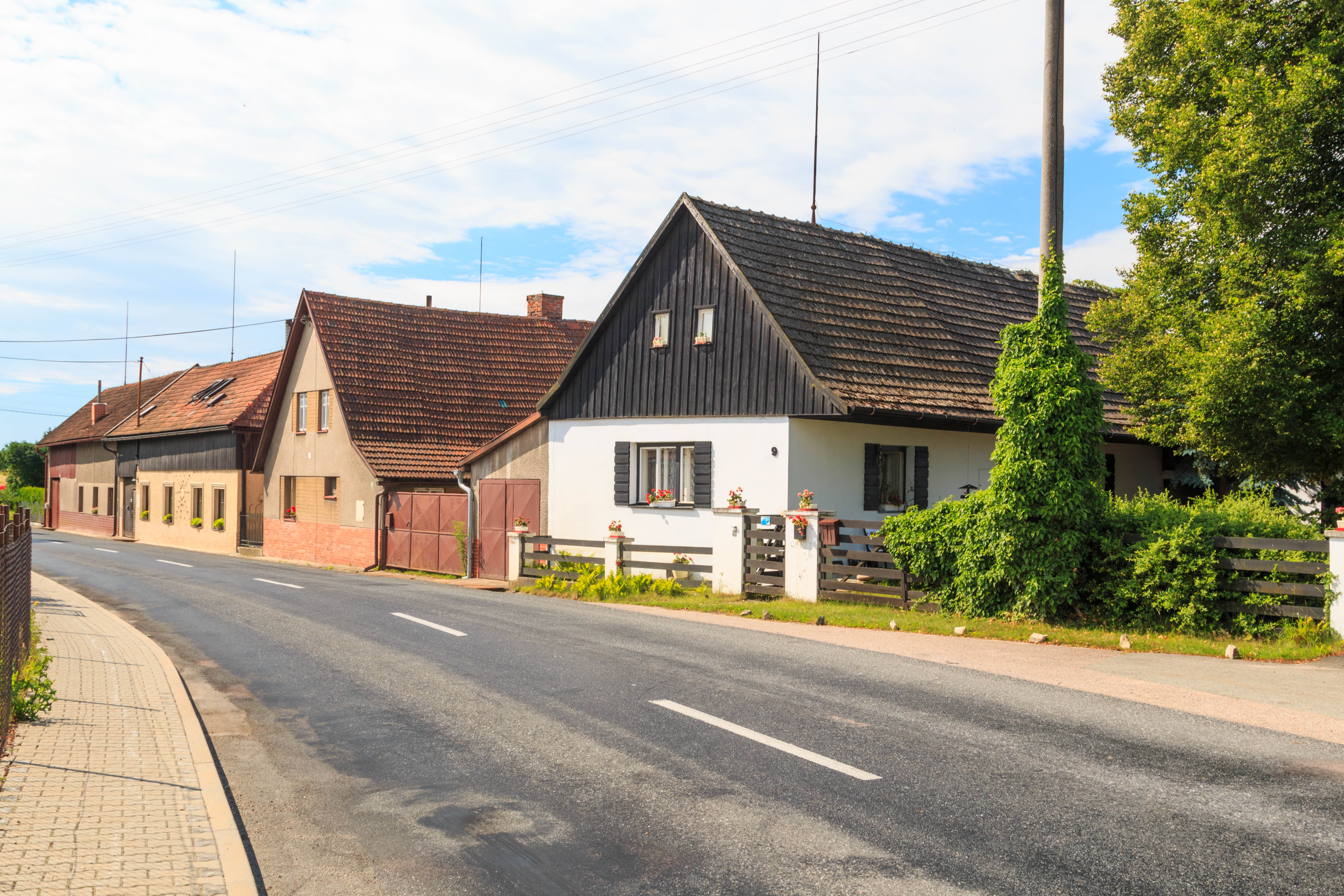 Smetana čp. 11